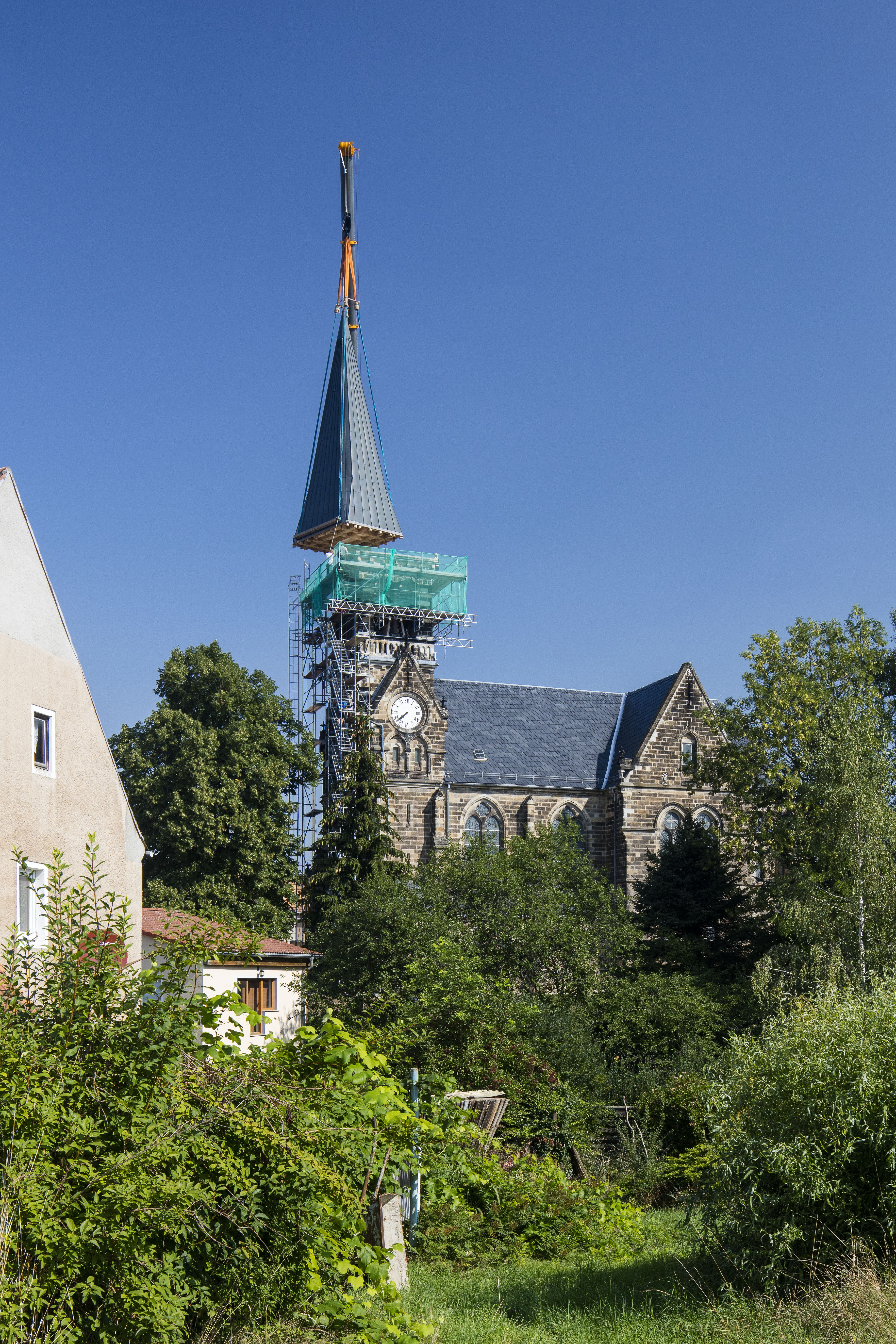 Aufsetzen der neuen Kirchturmspitze in Großdobritz am 1. September 2015.